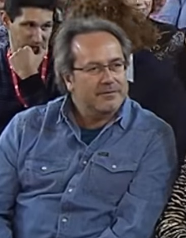 Francisco Guarido. 2016